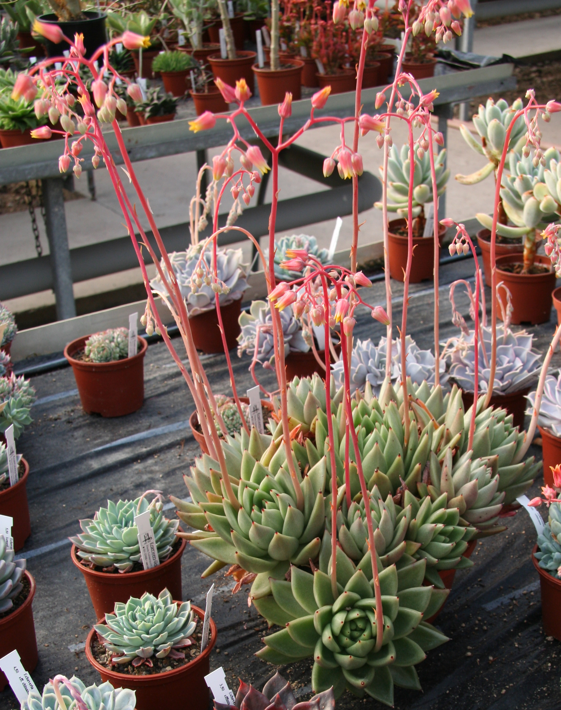 Echeveria agavoides in Kultur bei Kakteen-Haage in Erfurt